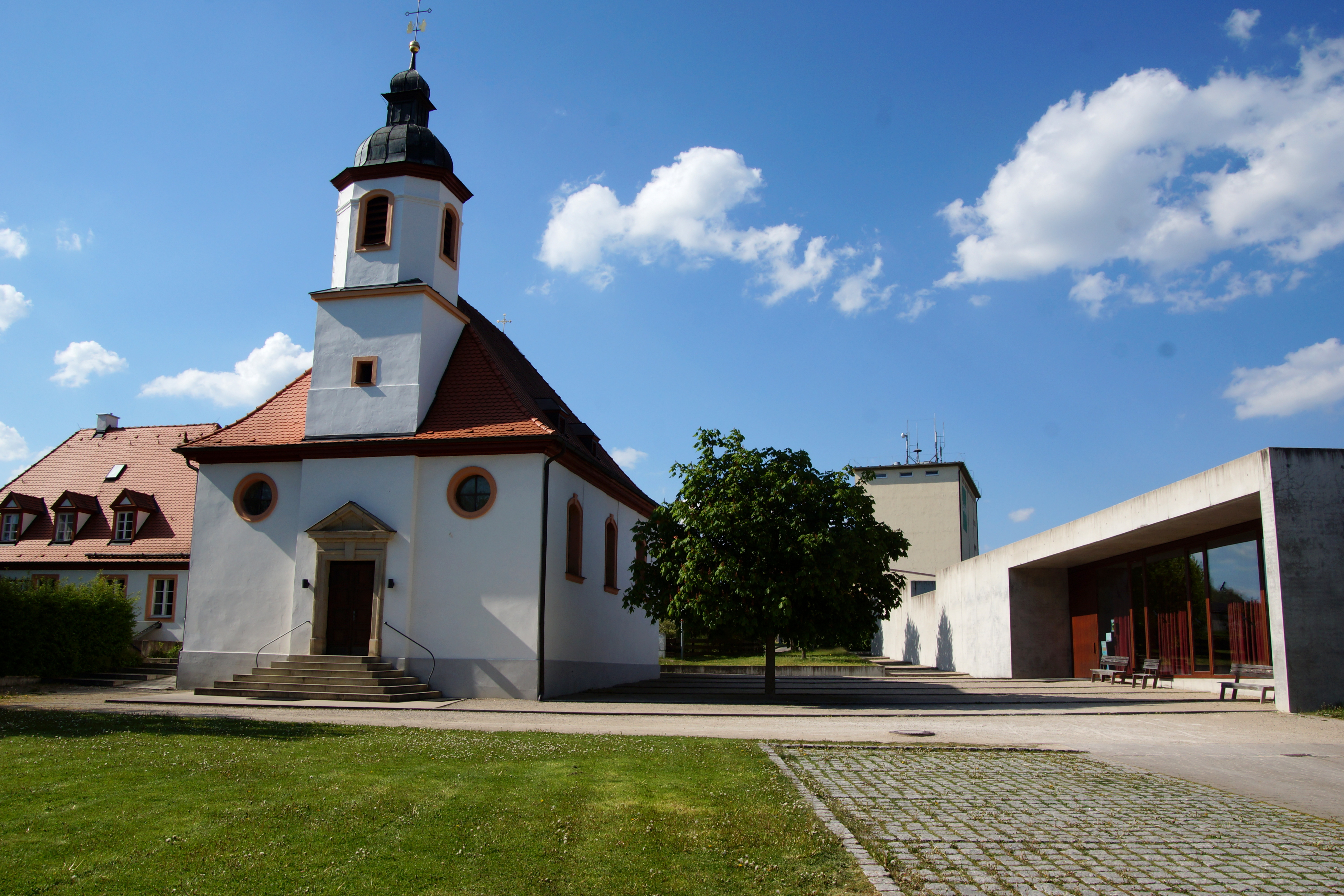 Die katholische Pfarrkirche St. Peter und Paul in Thalmässing